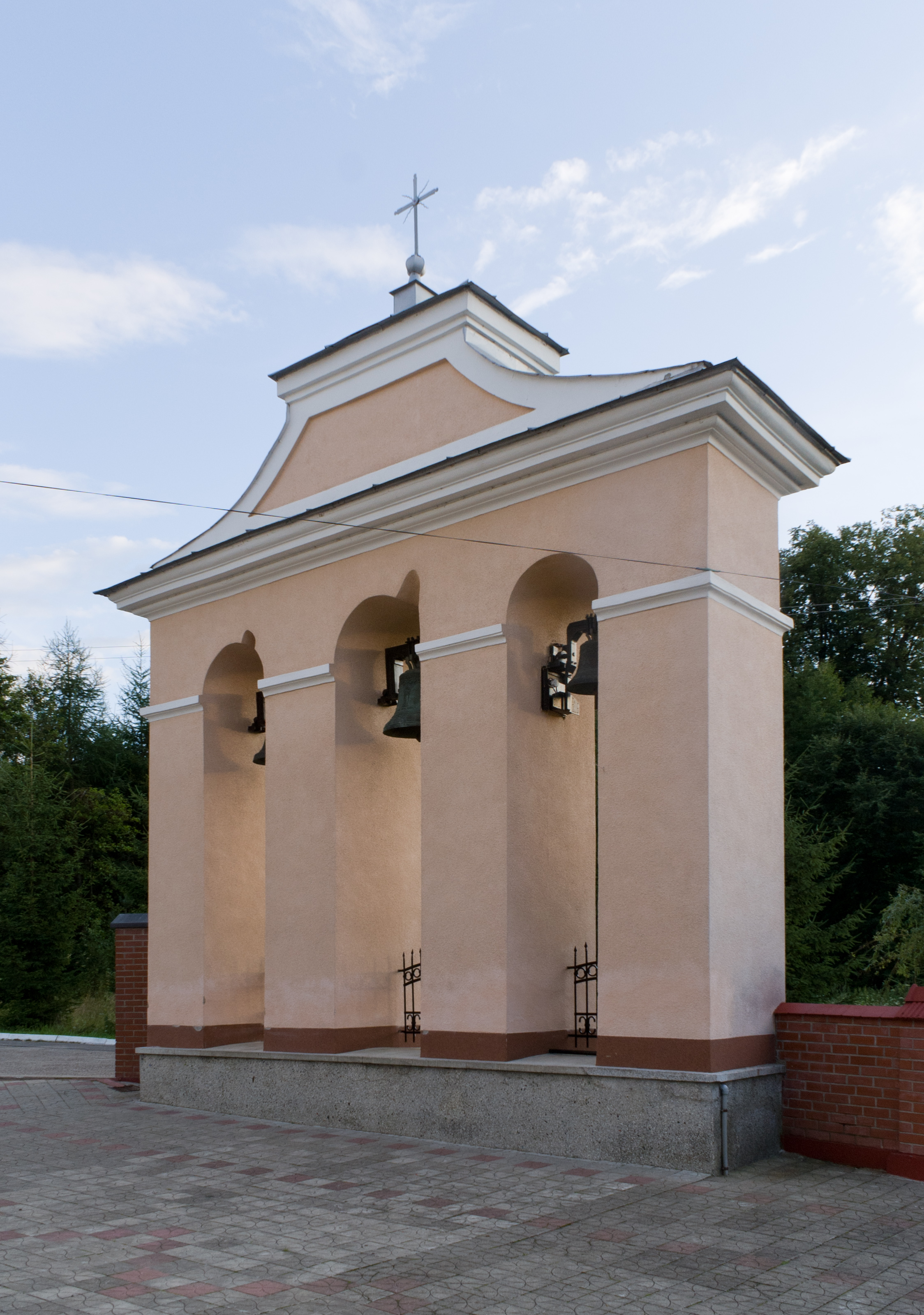 Murowana dzwonnica parawanowa w kształcie potrójnej arkady z roku 1845 przy kościele św. Stanisława Biskupa w Nozdrzcu. Znajduje się w niej zabytkowy dzwon z rosyjskimi napisami z roku 1856.